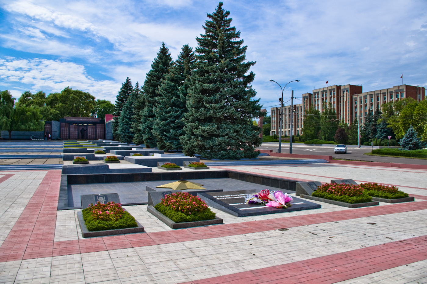 Мемориал Славы - общий вид